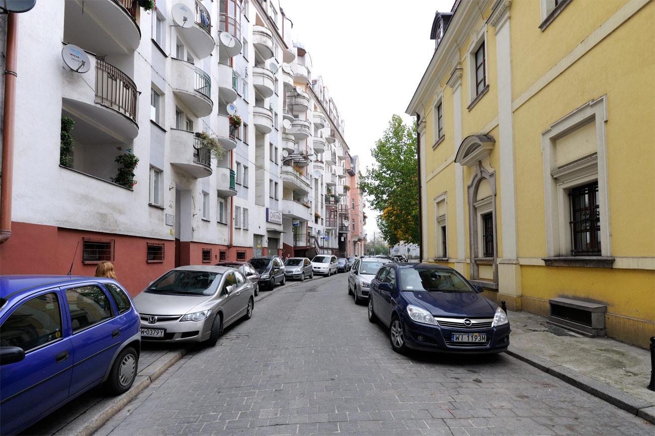 Plac Zgody, z prawej strony dawny pałac Webskych.